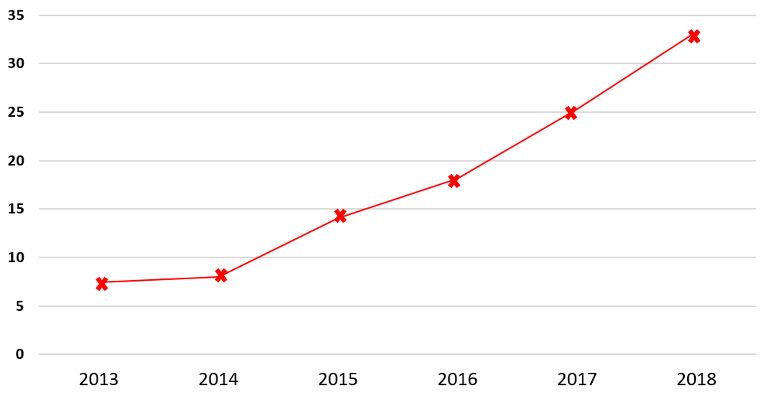 Evolución del número de parados durante la iv legislatura, según los datos del FMI.